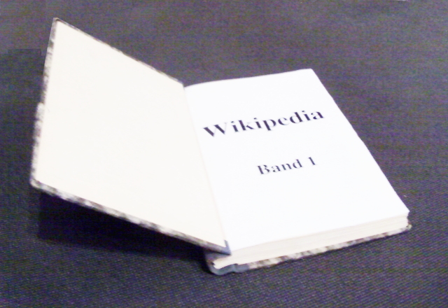 springback binder